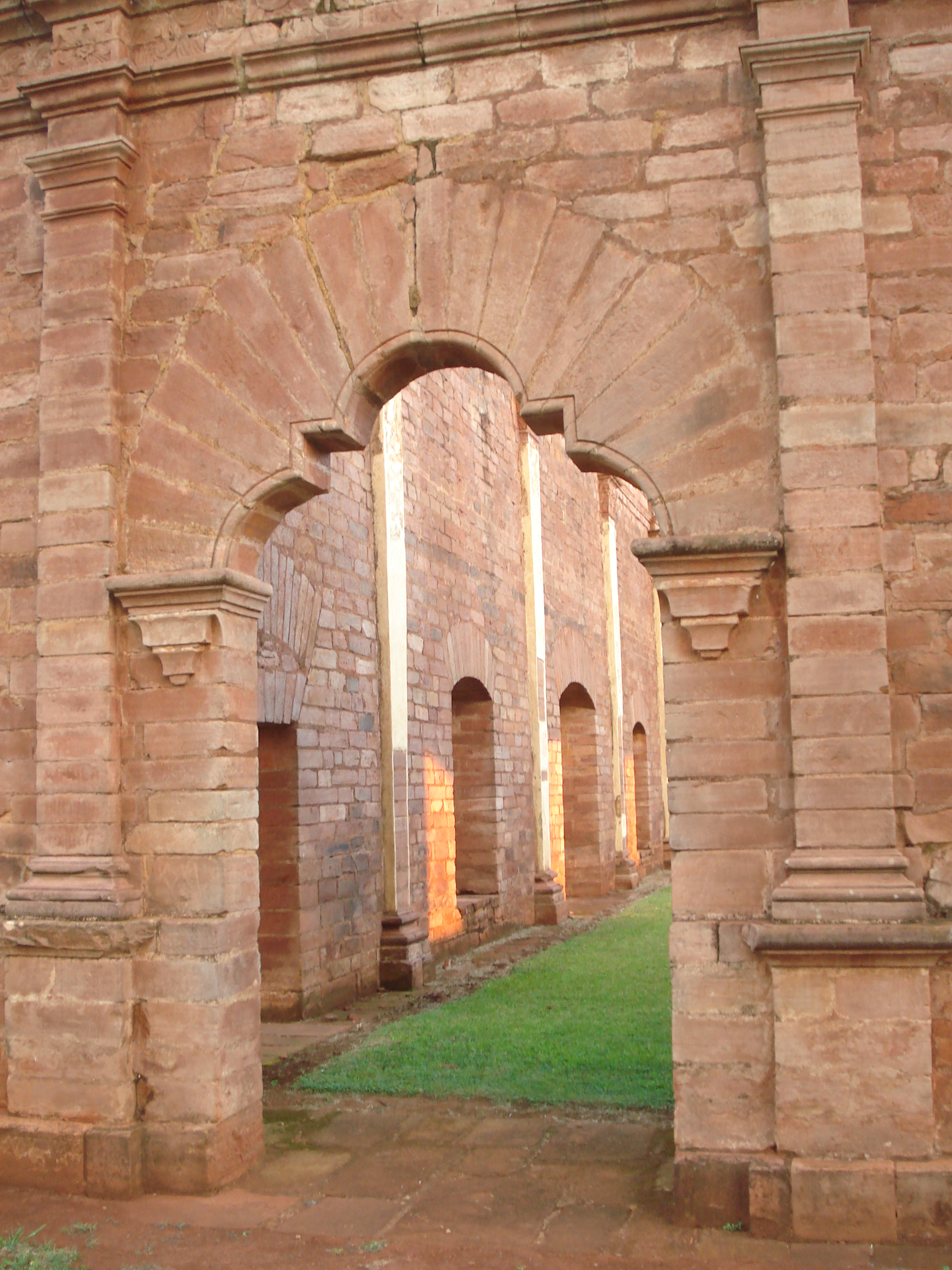 Ruinas jesuiticas Paraguay Acceso